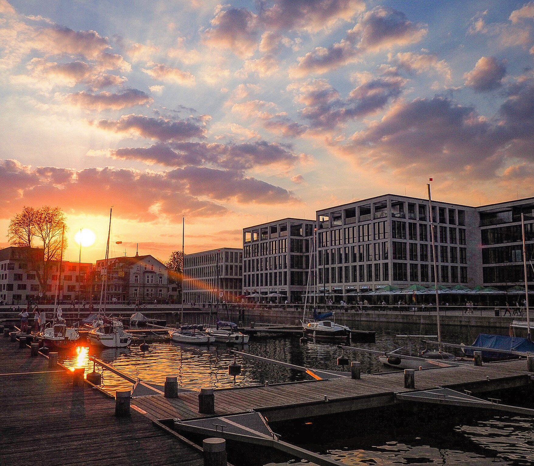 Hafenbecken Phoenixsee, Dortmund